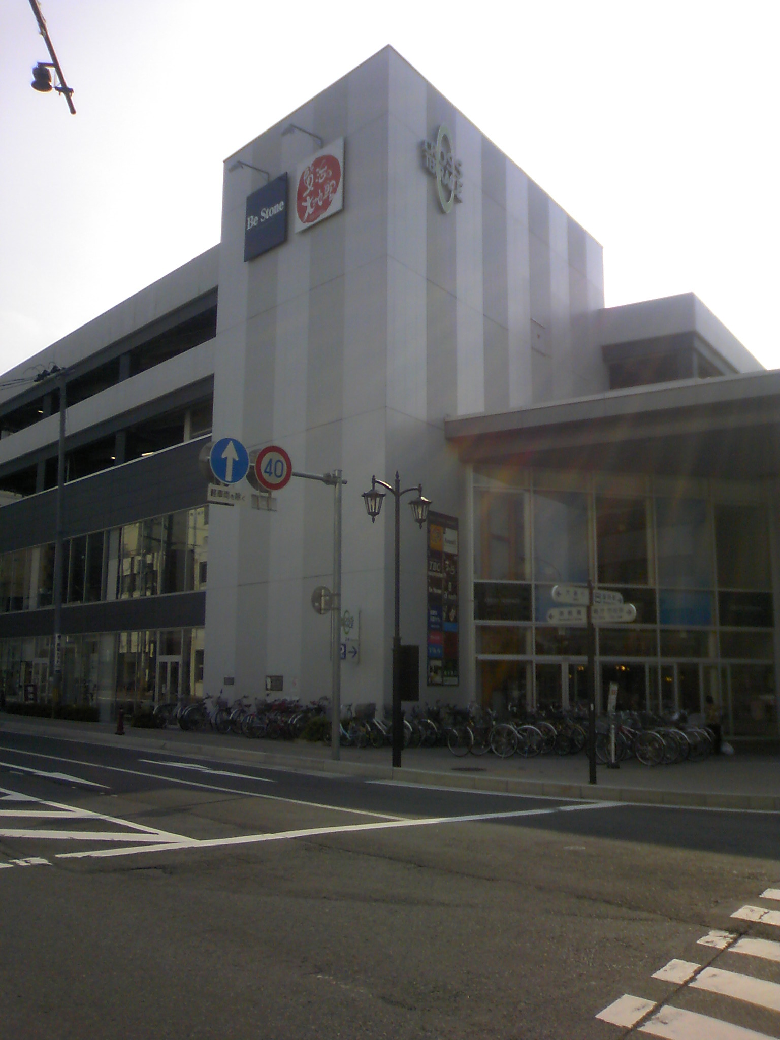 岩手県盛岡市の商業施設「クロステラス盛岡」